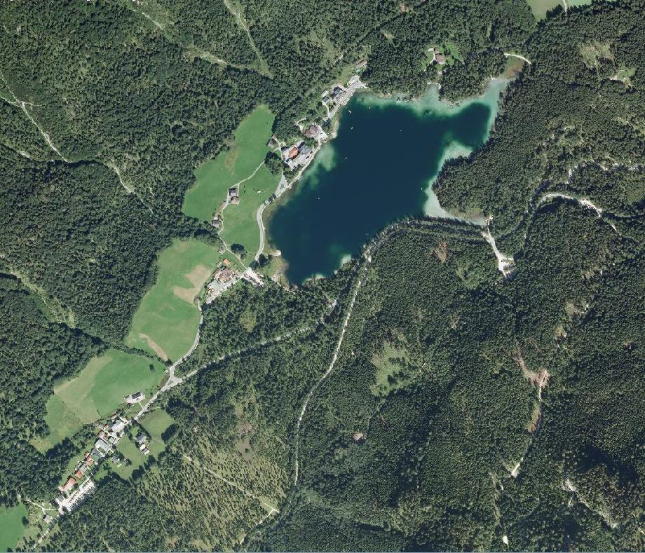 Hintersee (See und Dorf), Gemeinde Ramsau bei Berchtsgaden, Oberbayern